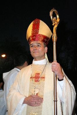 Monseñor Carlos Pellegrin Barrera